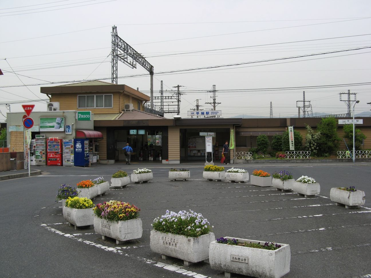 近鉄平端駅 駅舎